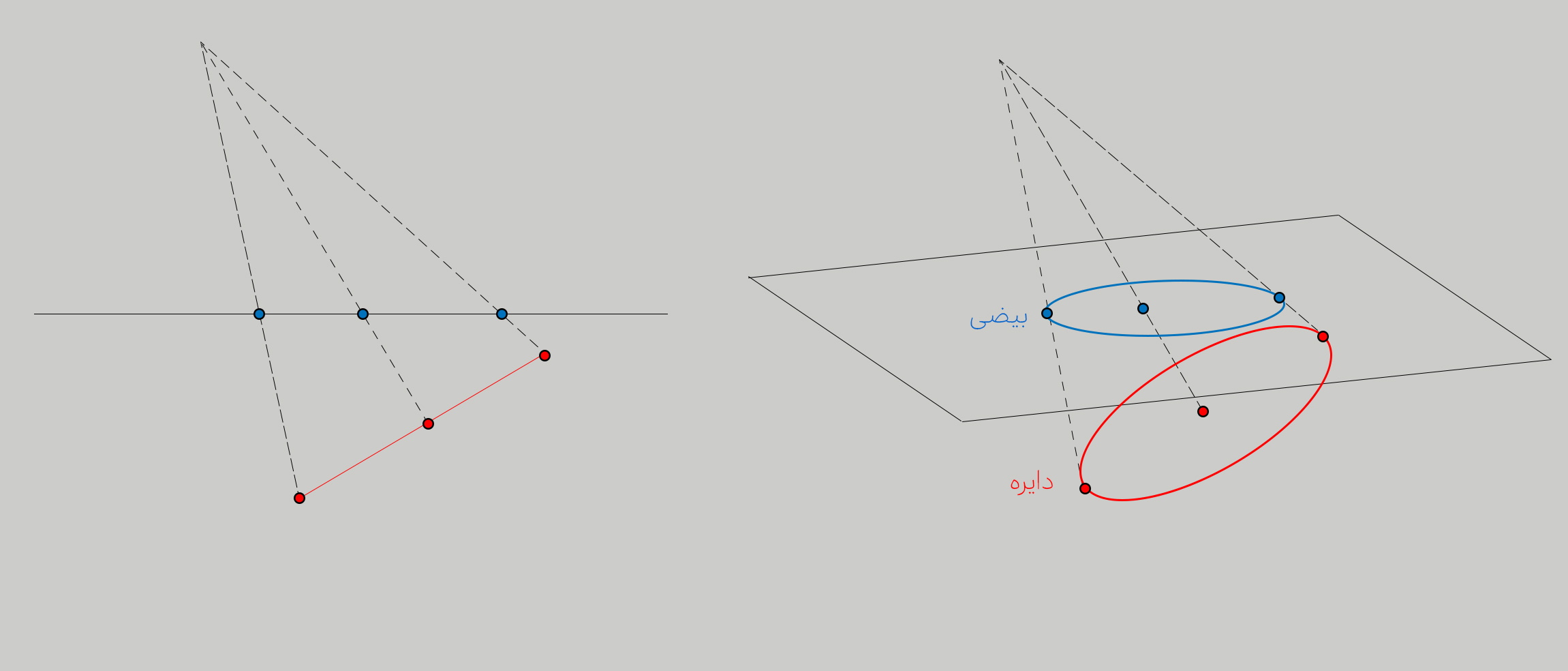 تصویر مرکزی دایره به بیضی، مقاطع مخروطی